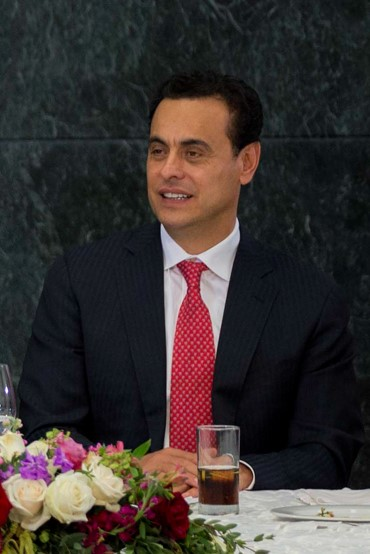 Ismael Hernandez Deras, senador de México de 2012 a 2018